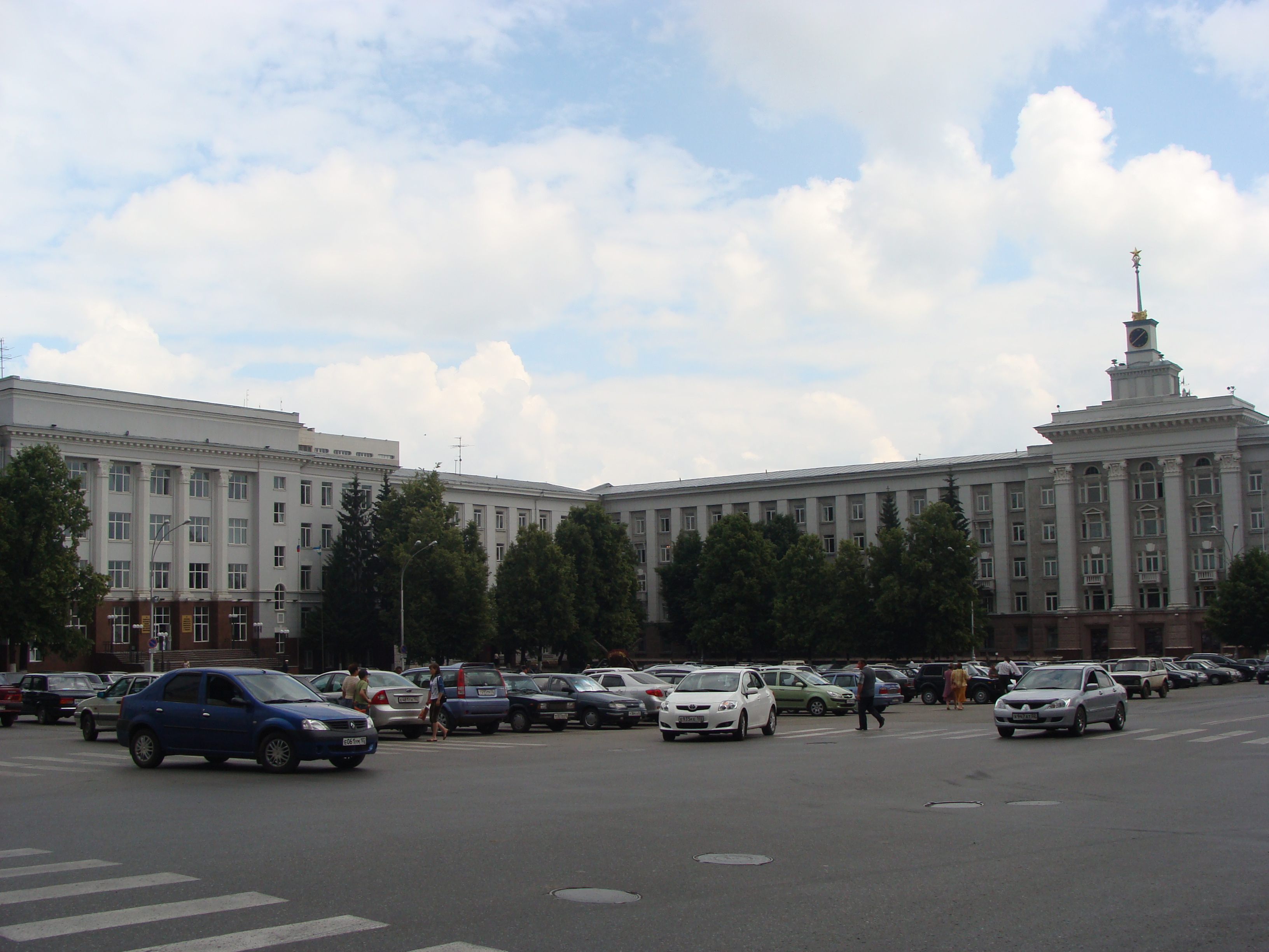 Советская площадь